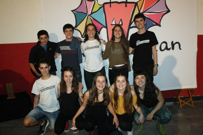 Ekhiñe Zapiain